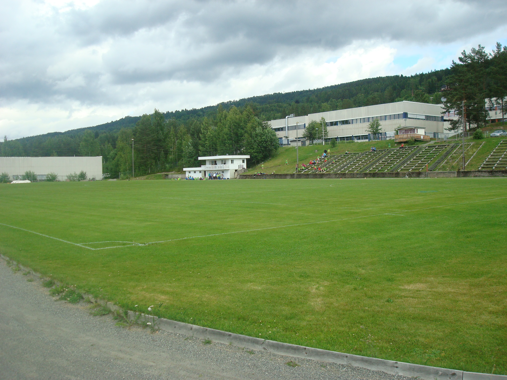 Dokka Stadion